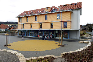 Primarschule Embrach